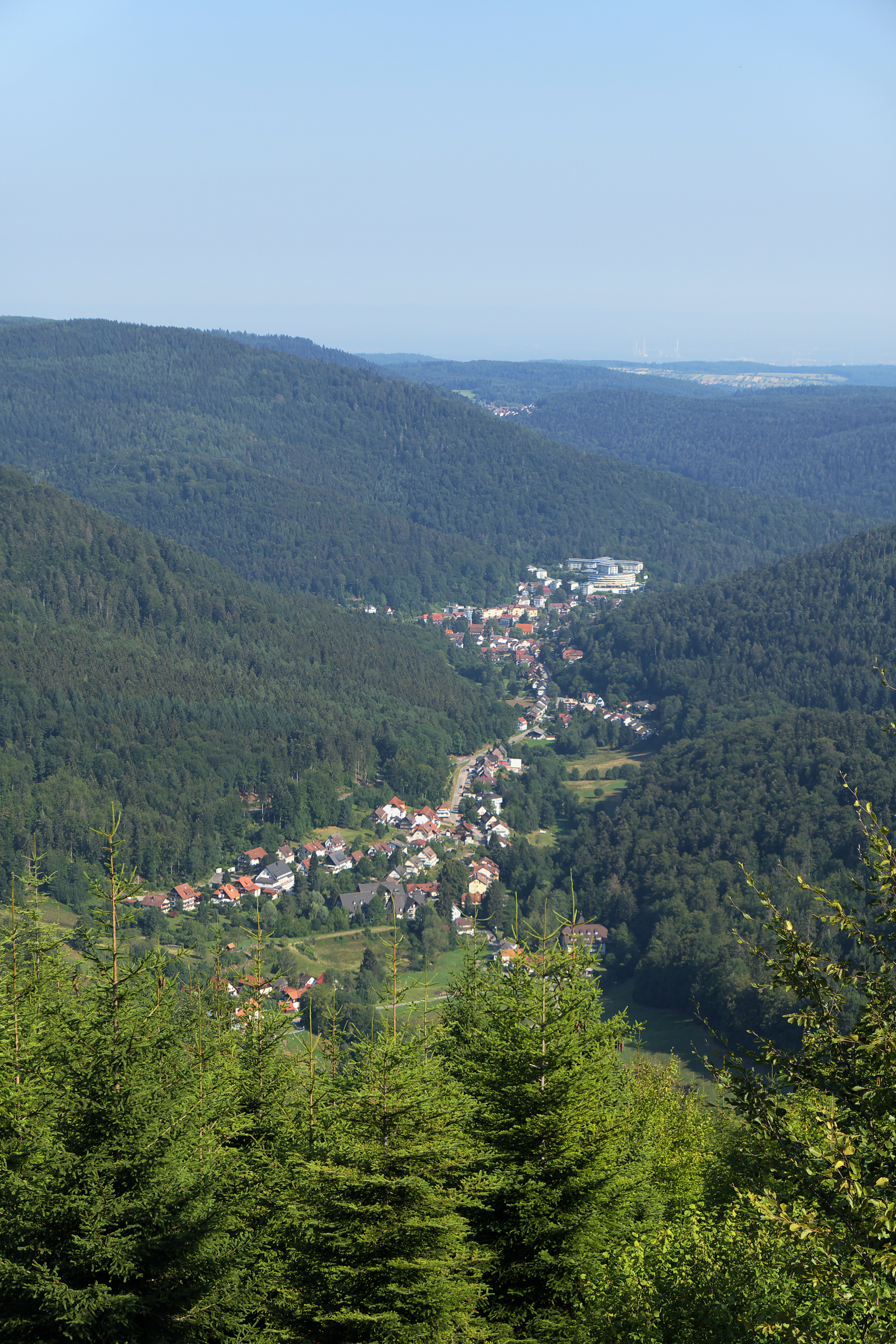 "Traumblick" am Westweg von Südwesten durch das Gaistal auf Bad Herrenalb